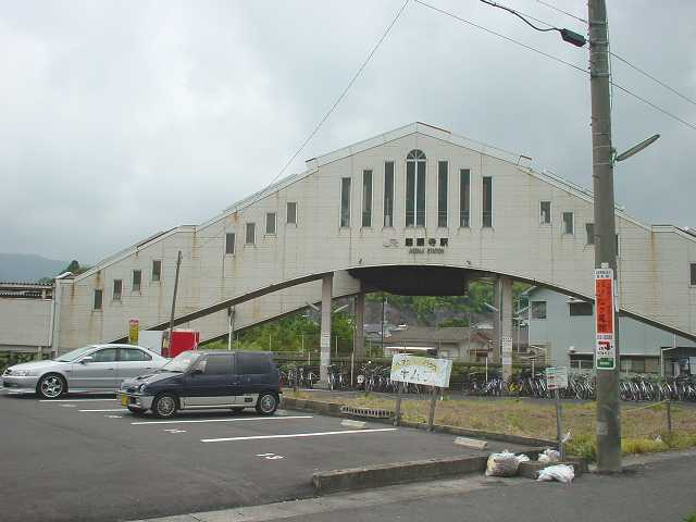 JR慈眼寺駅（2005年7月投稿者が撮影）